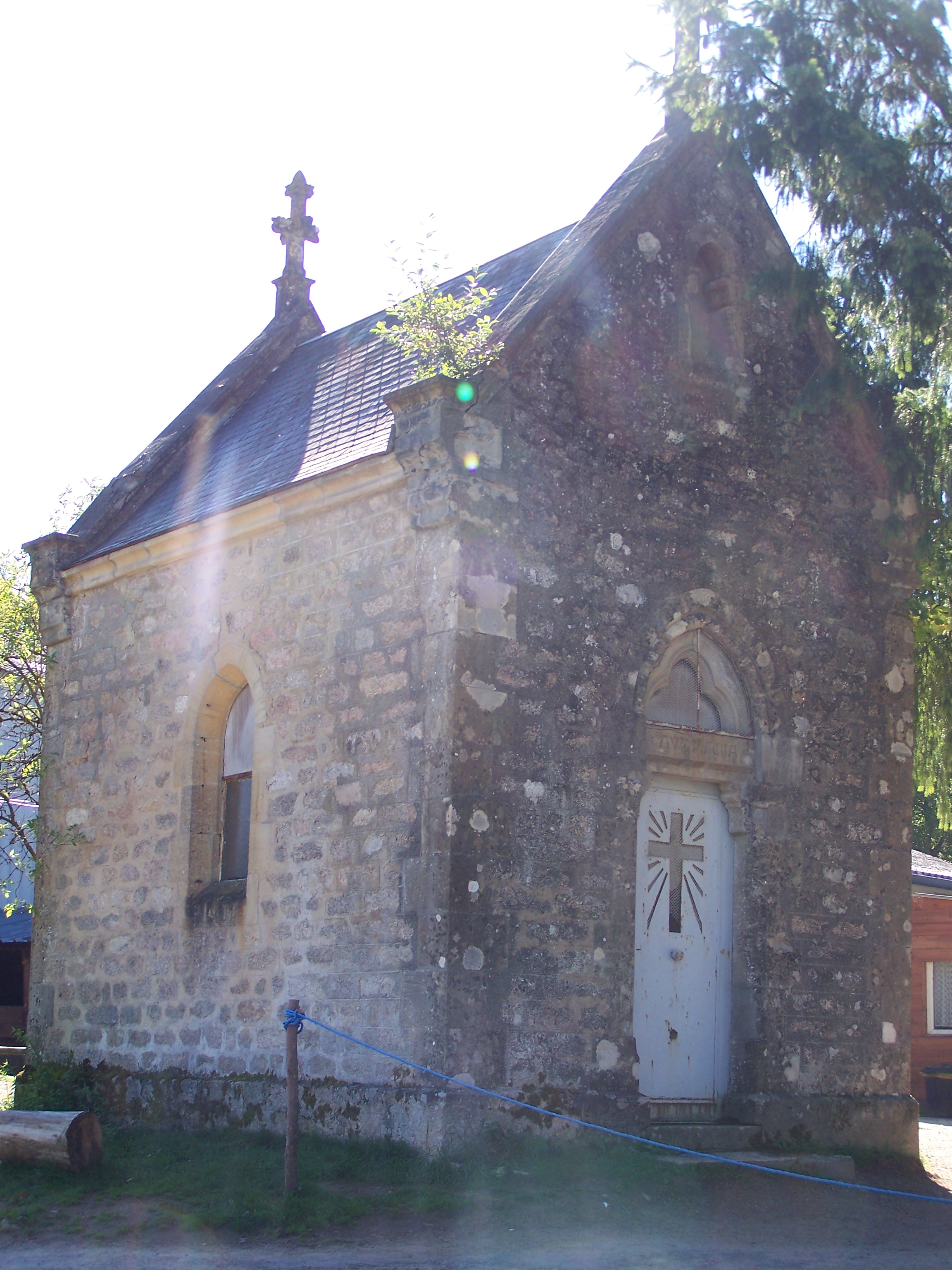 La chapelle du Chêne à Château-Chinon (Ville) (Nièvre, France)